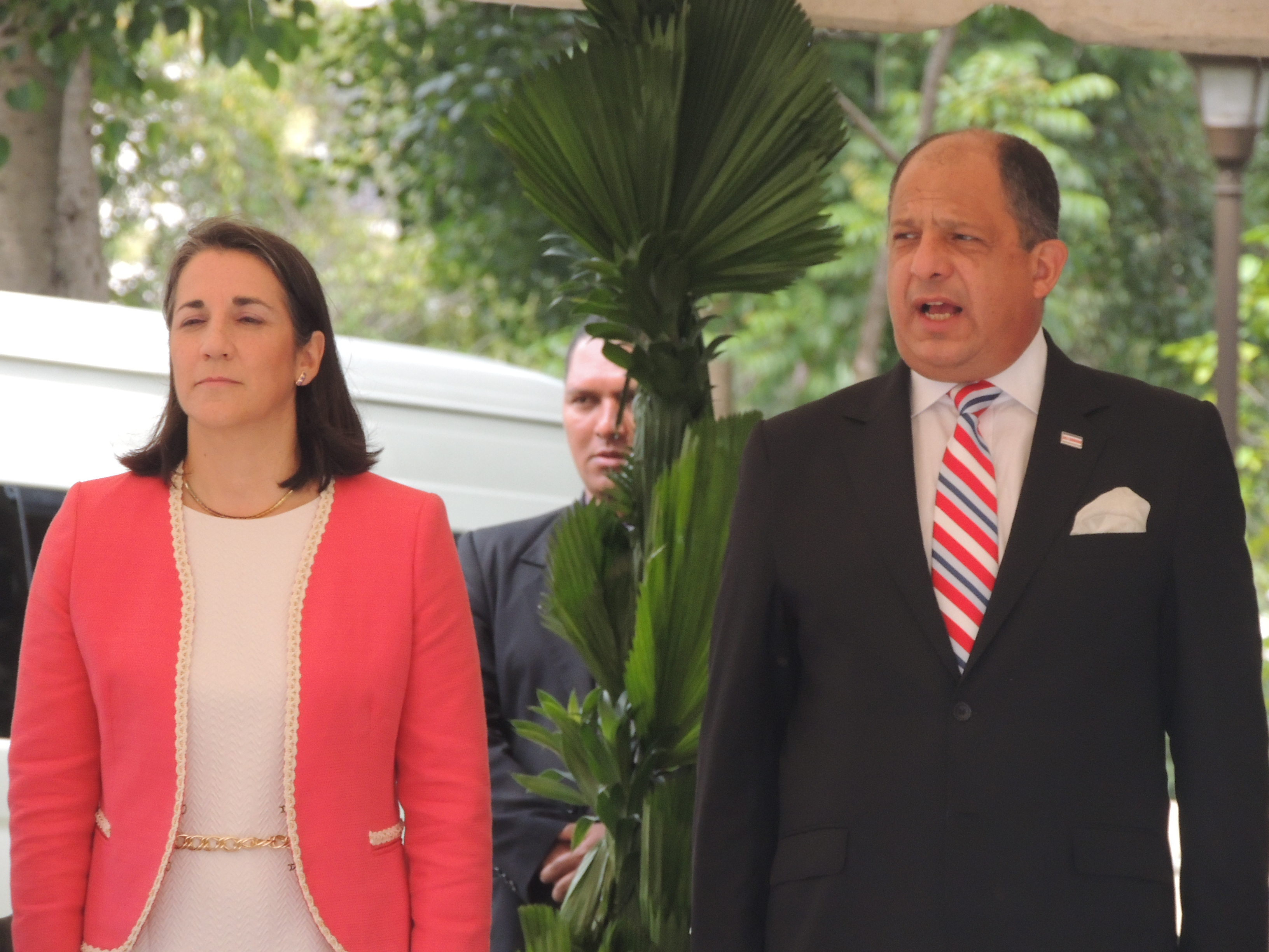 Luis Guillermo Solís, Presidente de Costa Rica